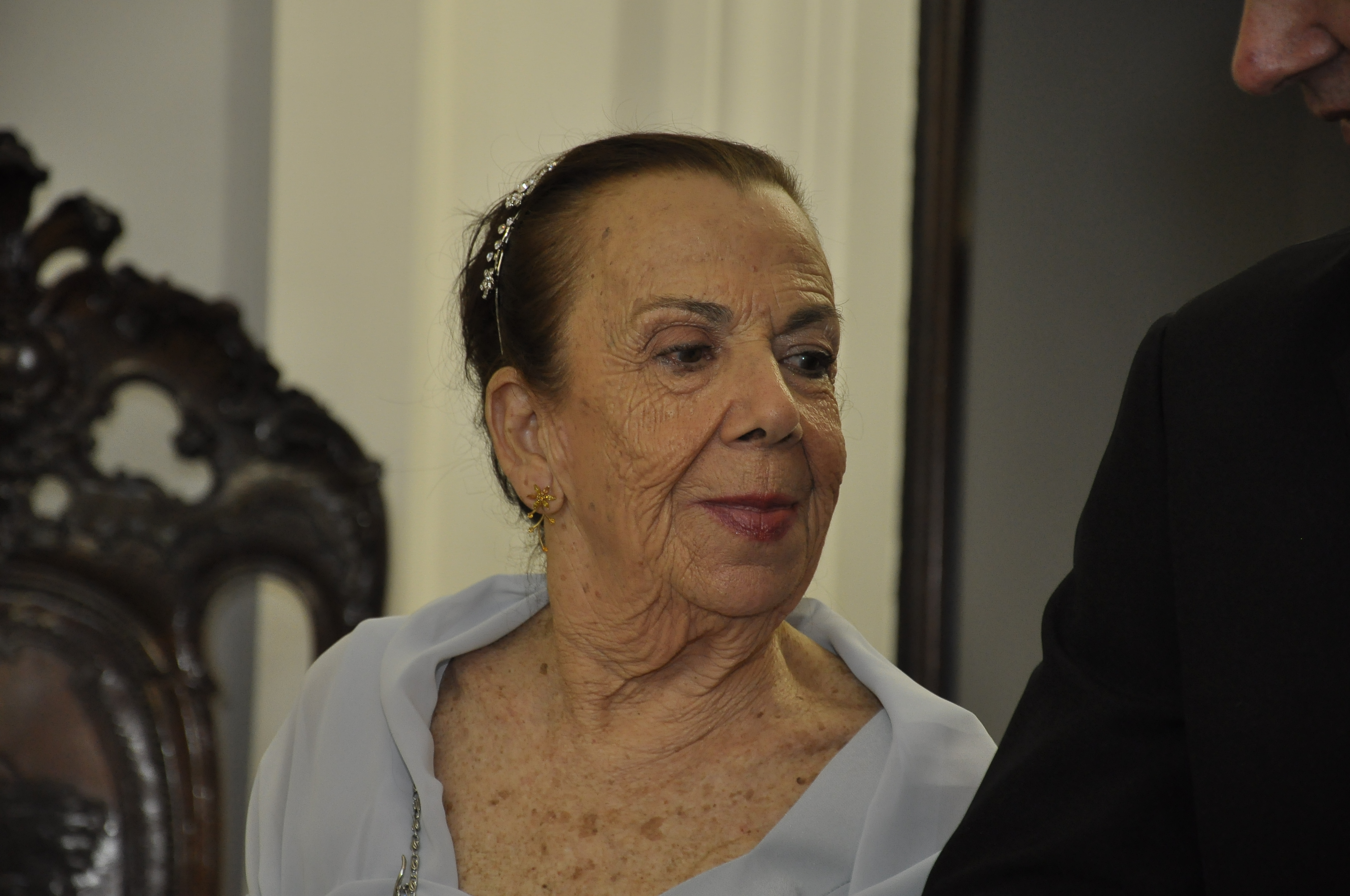 Igreja do Palacio Guanabara -arquivo pessoal